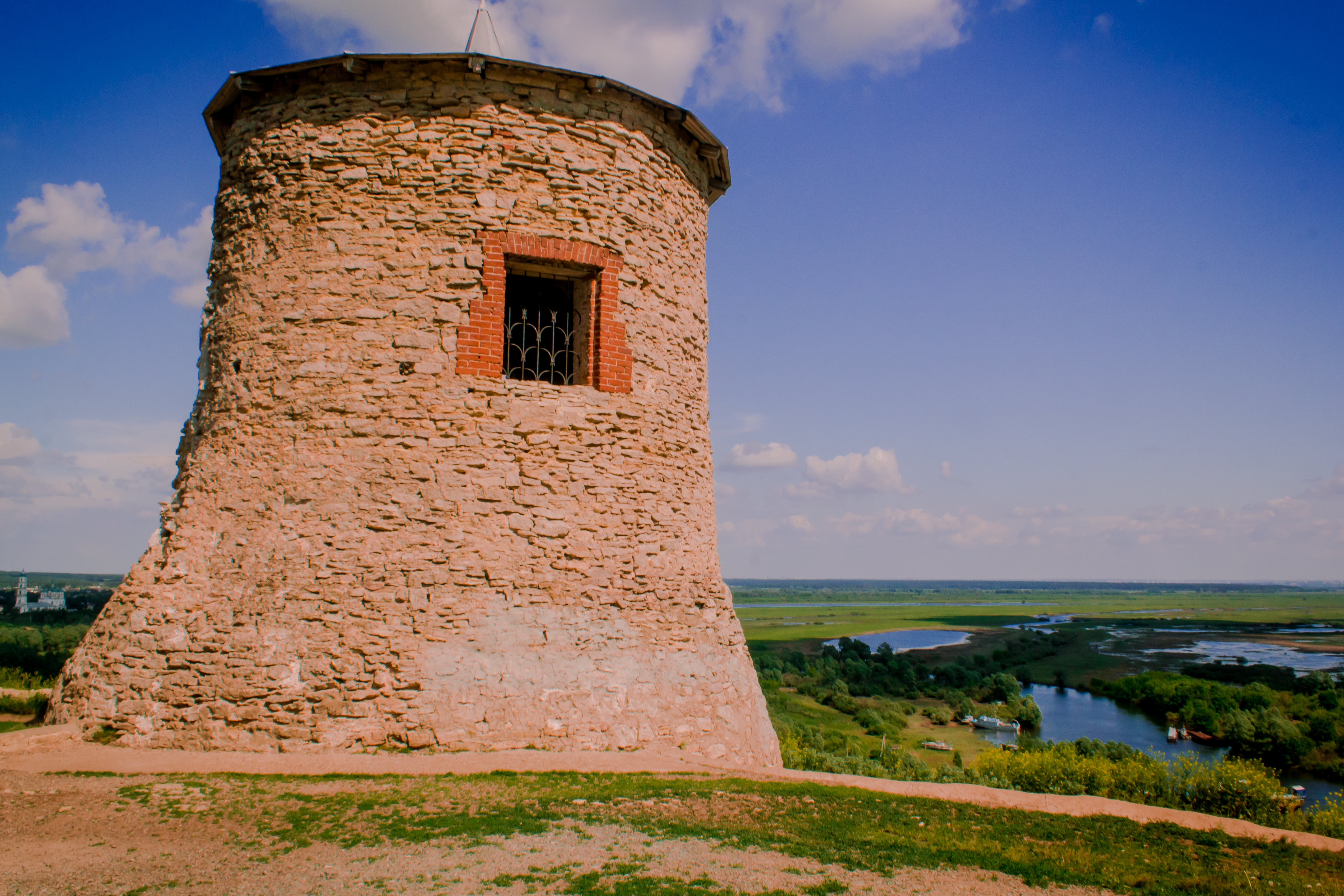 Городище "Чертово": 1 км юго-западнее города, берег р.Тойма, Елабуга, Татарстан